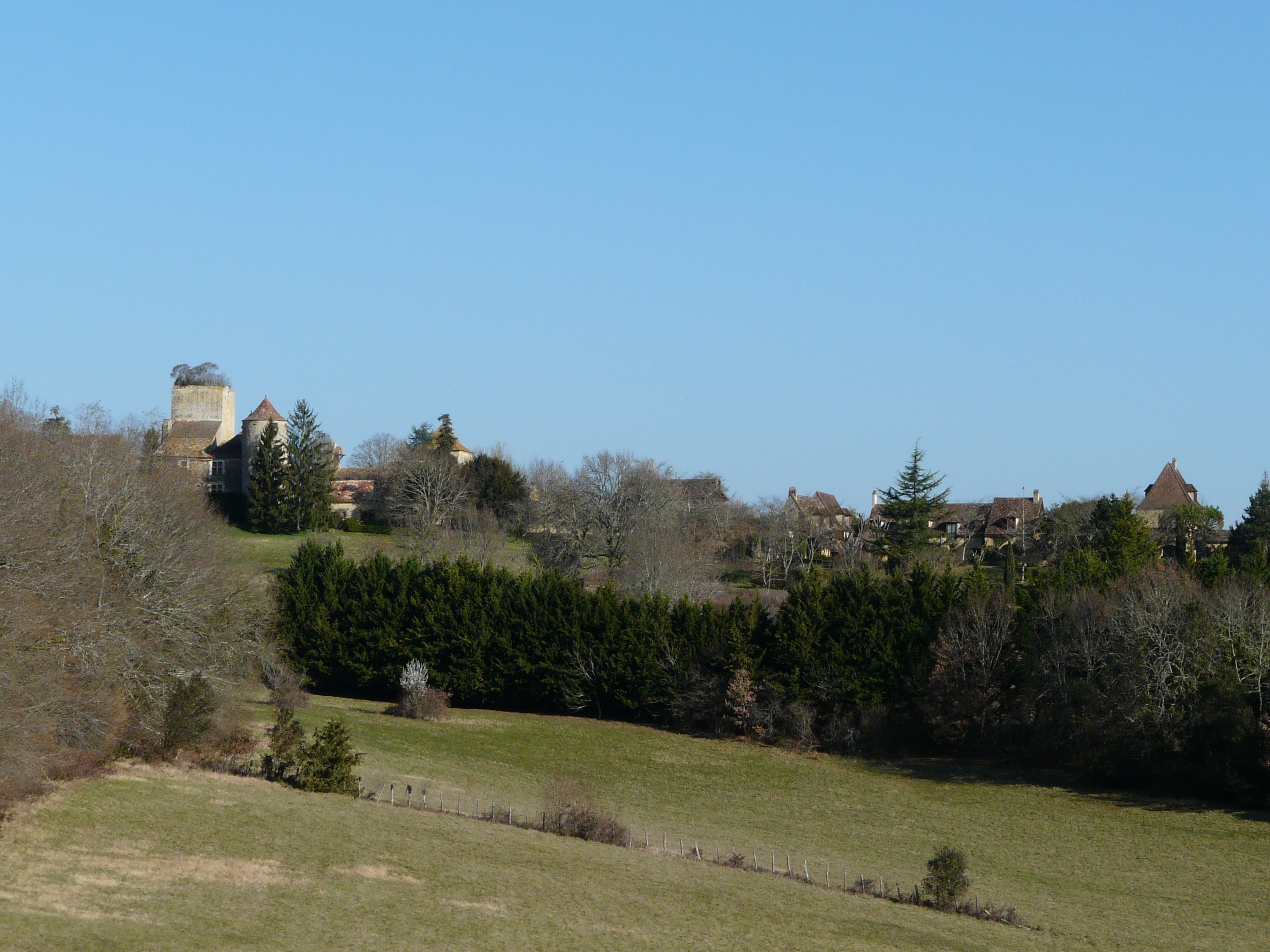 Le village de Baneuil vu du sud, Dordogne, France.